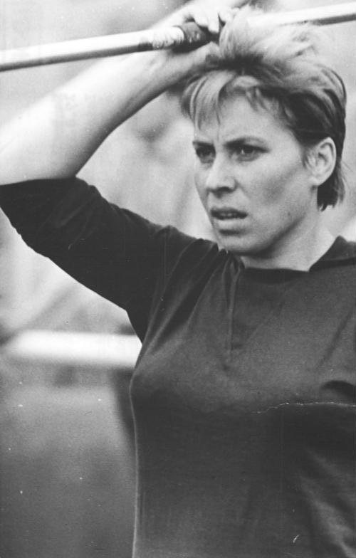 Inge Schwalbe Zentralbild Wendorf 17.08.1964 Leichtathletik: Inge Schwalbe mit Welt-Jahresbestleistung. In guter Verfassung stellte sich die Mehrzahl der Kandidaten für die Leichtathletik-Olympiaausscheidungen am 15.08.1964 bei einer letzten Überprüfung im Potsdamer Stadion Luftschiffhafen vor. Aus den Ergebnissen ragten vor allem der Deutsche Hochsprungrekord von 1,76 m durch Karin Rüger (SC DHfK Leipzig) und die neue Welt-Jahresbestleistung von Inge Schwalbe (SC Dynamo Berlin) (unser Bild) mit 57,31 m im Speerwerfen heraus. (Archivfoto) Abgebildete Personen: Schwalbe, Inge: Leichtathletin, SC Dynamo Berlin, Olympiade 1964, DDR